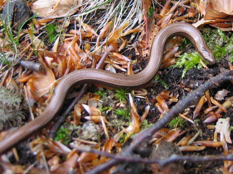 Blindschleiche Anguis fragilis, Rügen